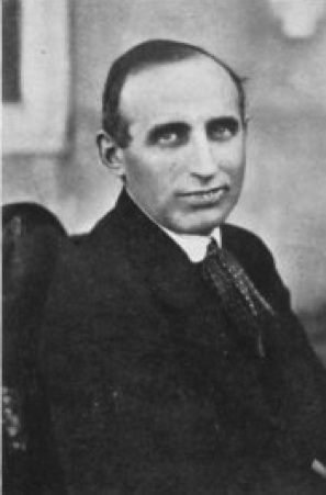 Varga Jenő népbiztos